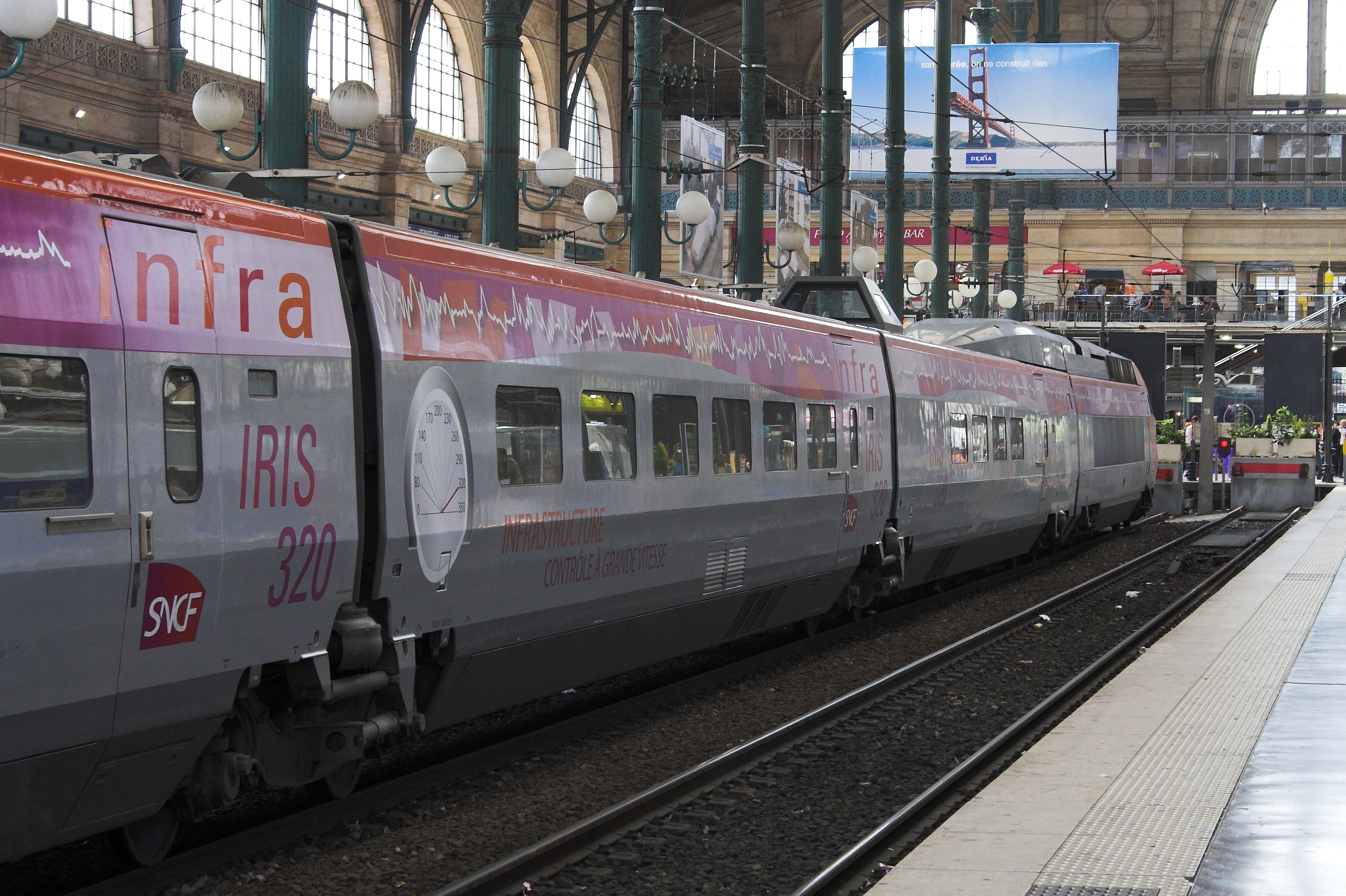 IRIS 320(Gare du Nord, France)